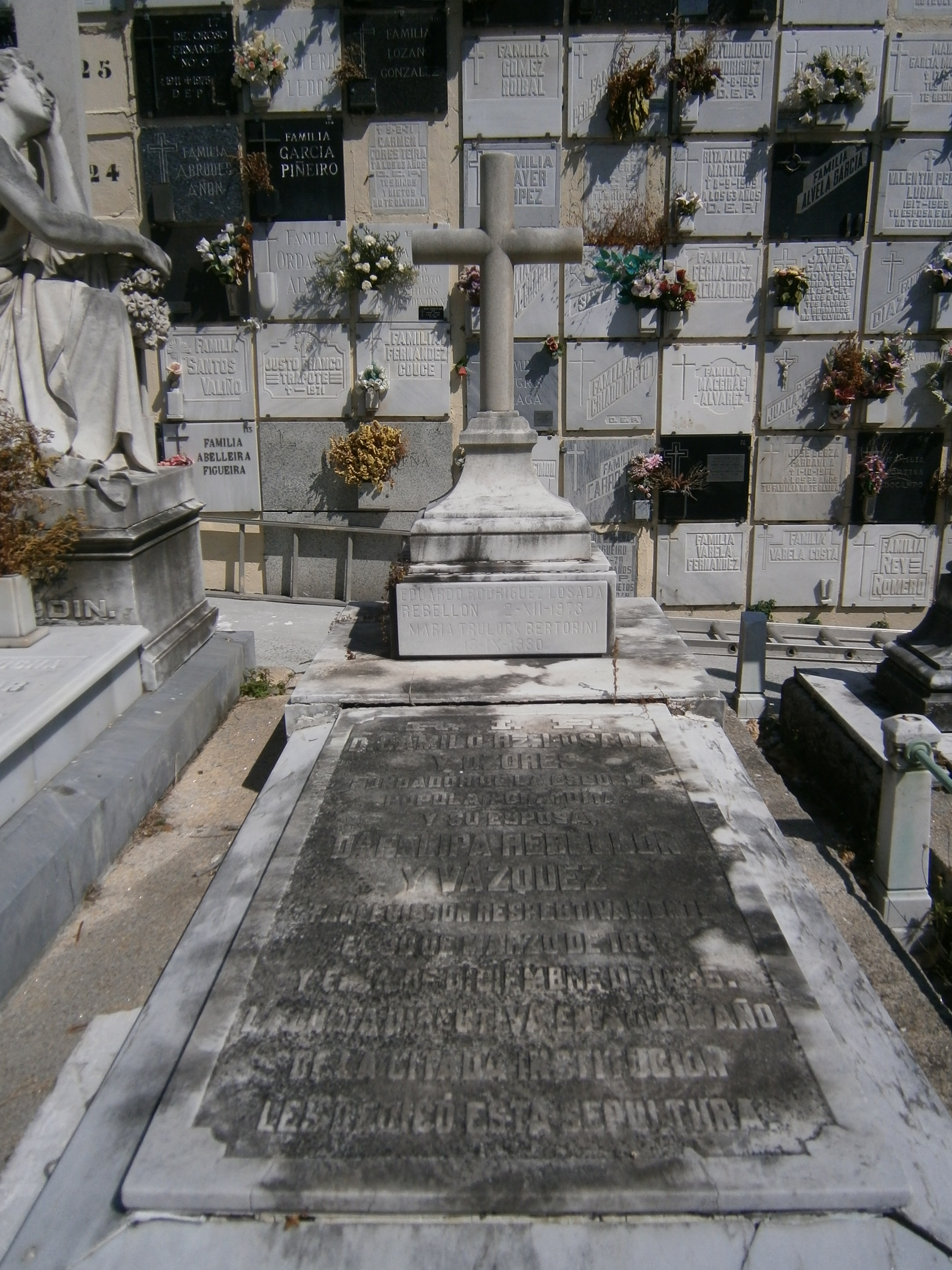 Tumba na Coruña de Eduardo Rodríguez-Losada